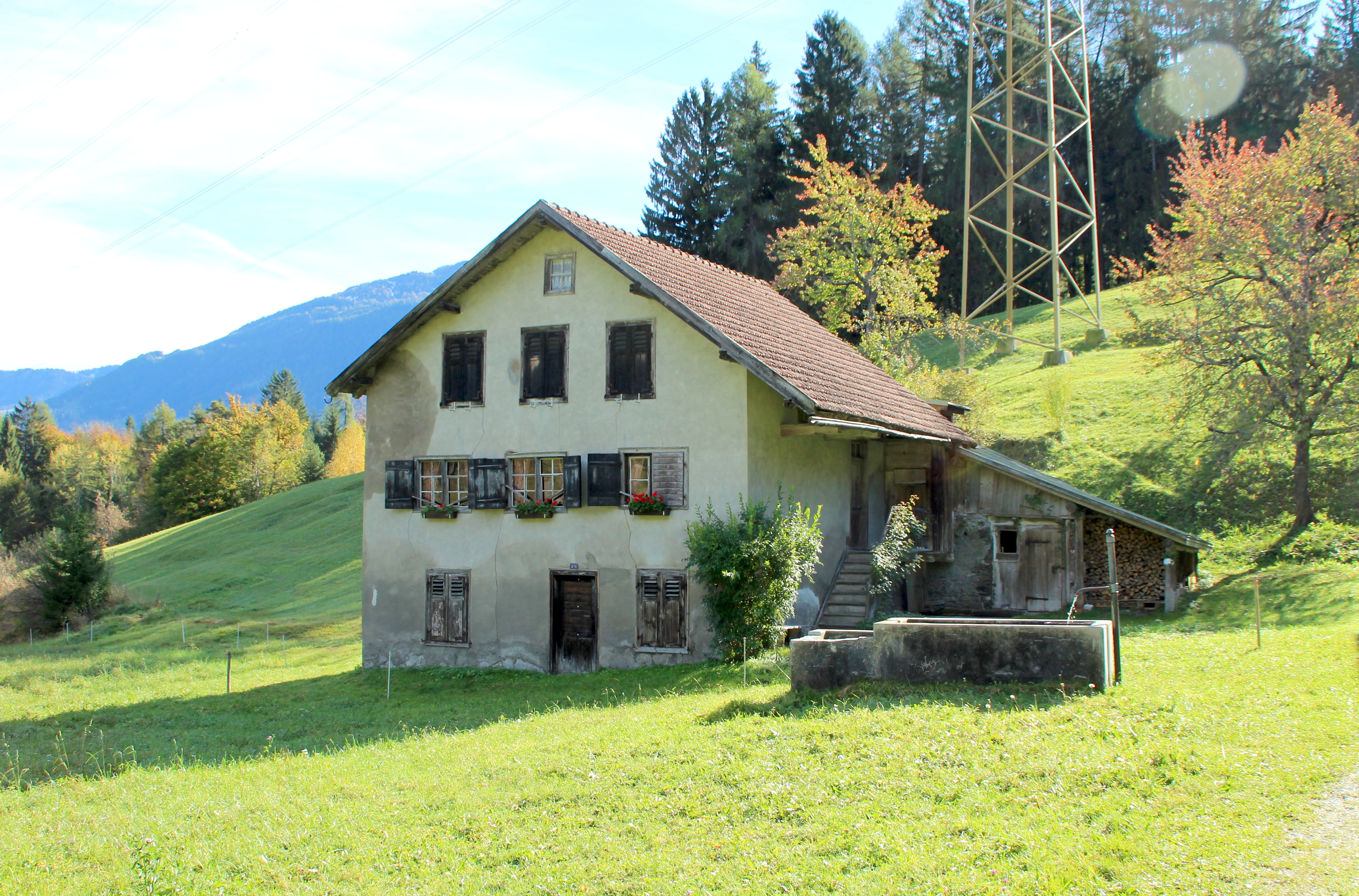 Weihermühle